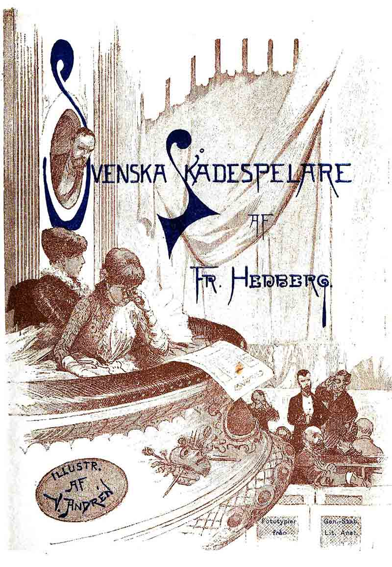 Frans Hedberg: Svenska skådespelare: karakteristiker och porträtter. Book cover